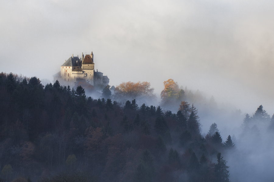 Photo du Château de Menthon-Saint-Bernard prise le matin alors que la forteresse sort du brouillard